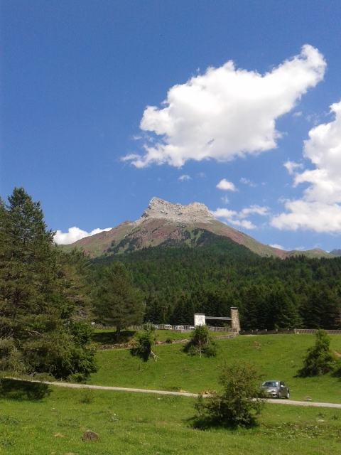 El pico Castillo de Acher visto desde Oza.